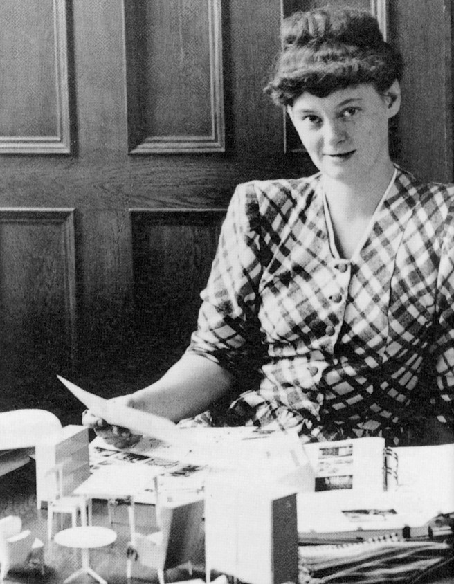 Inredningsarkitekt Lena Larsson ca. 1940